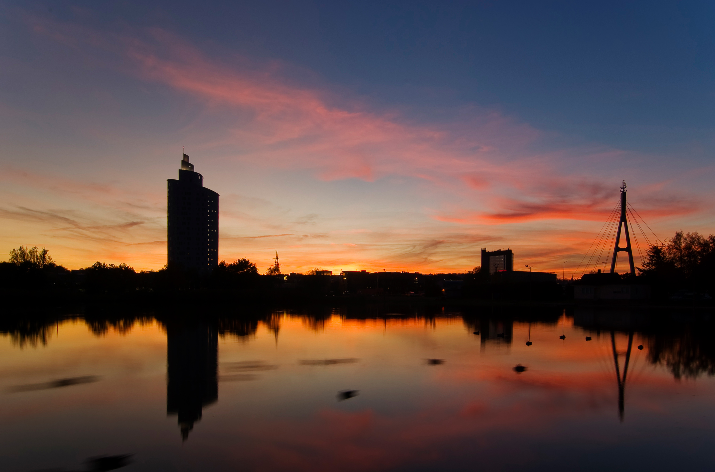 Anne kanal Tigutorni, Emajõe Ärikeskuse ja Turusilla siluettidega